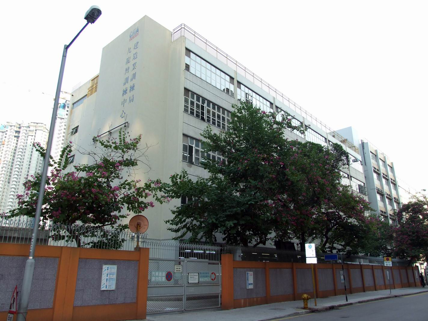 九龍灣建造業議會訓練學院